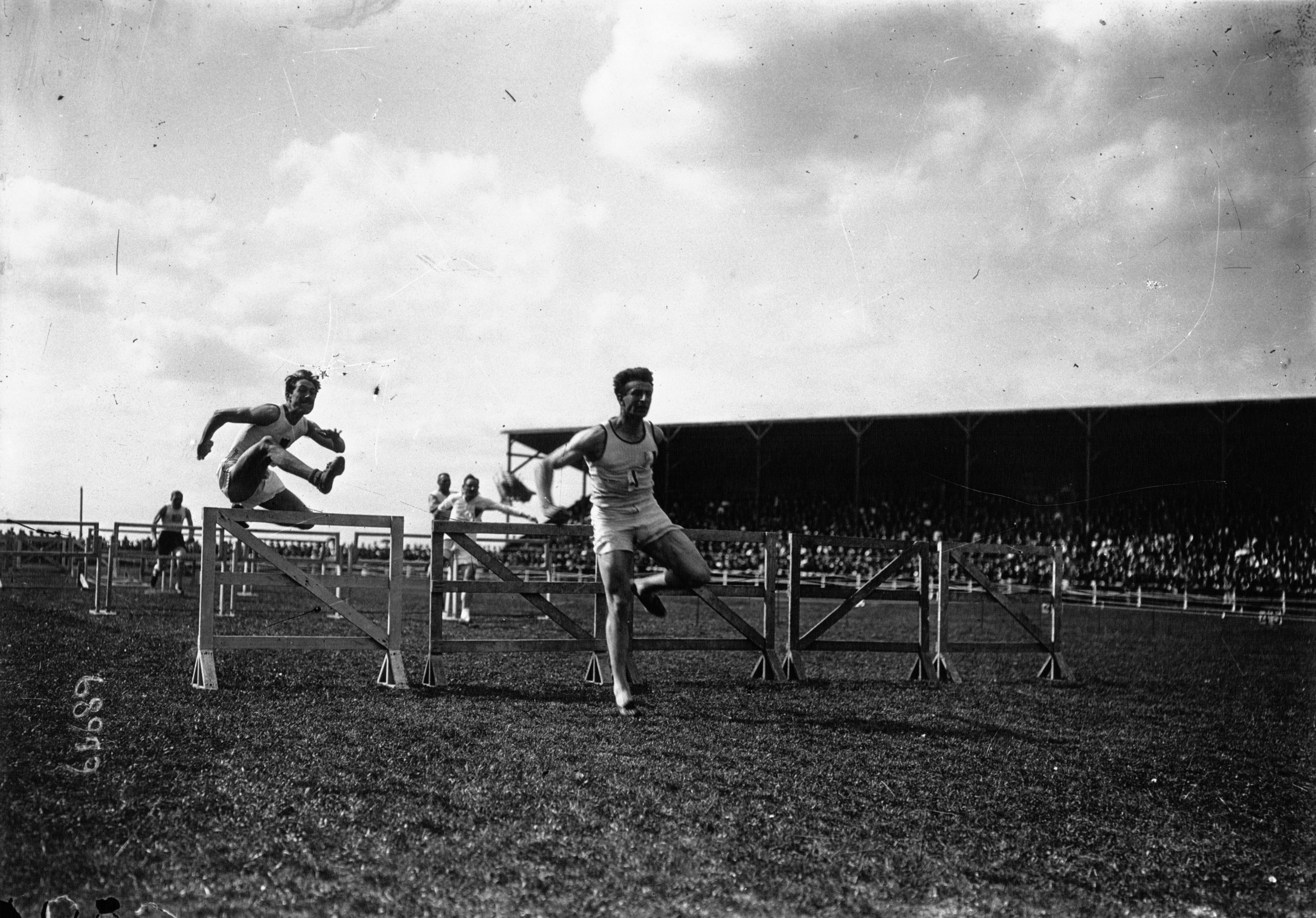 Inauguration du stade Bergeyre aux Buttes-Chaumont : le 100 m haies le vainqueur André. Il s'agit du 110 mètres haies : voir sources sur l'article dédié au stade Bergeyre.